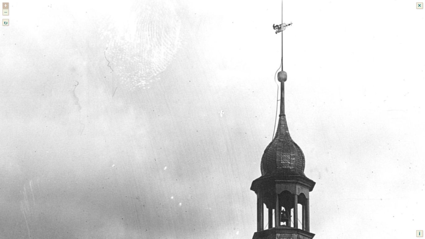 Schönheide im Erzgebirge: Martin-Luther-Kirche in einem Foto aus der Zeit um 1907. Der Turm ist noch nicht mit Kupferblech beschlagen, sondern kunstvoll mit Schiefer gedeckt. Oben in der Turmhaube hängt eine kleine Glocke, die die Evangelisch-lutherische Kirchgemeinde später nach Annaberg verkaufte, wo sie im 21. Jahrhundert im Museum aufbewahrt wird. Einmal wurde sie für eine Ausstellung in das Bürsten- und Heimatmuseum Schönheide ausgeliehen.In der Neuen Sächsischen Kirchengalerie wird in Band 19 aus dem Jahr 1901, der auch die Beschreibung der Kirchgemeinde Schönheide zum Inhalt hat, berichtet: "Die vierte Glocke (unter der Turmhaube) trägt die Inschrift: GOT * VNSER * TROST * HIE * VND * DORT * 1559. Das Alter dieses Glöckchen spricht für die Anschauung, welche hier besteht, nämlich, daß vor der Erbauung der ersten Kirche hier eine Kapelle gestanden habe. In Inschrift könnte auf eine Gottesackerkapelle schließen lassen, die auch zu Gottesdiensten Verwendung fand. Auch ist es leicht denkbar, daß wir in diesem Glöckchen ein altes Hauerglöckchen besitzen. Jetzt wird es geläutet vormittags elf Uhr und bei Eintritt der Dämmerung." (Wortlaut in: Neue Sächsische Kirchengalerie, Band 19, Spalte 570 f.).